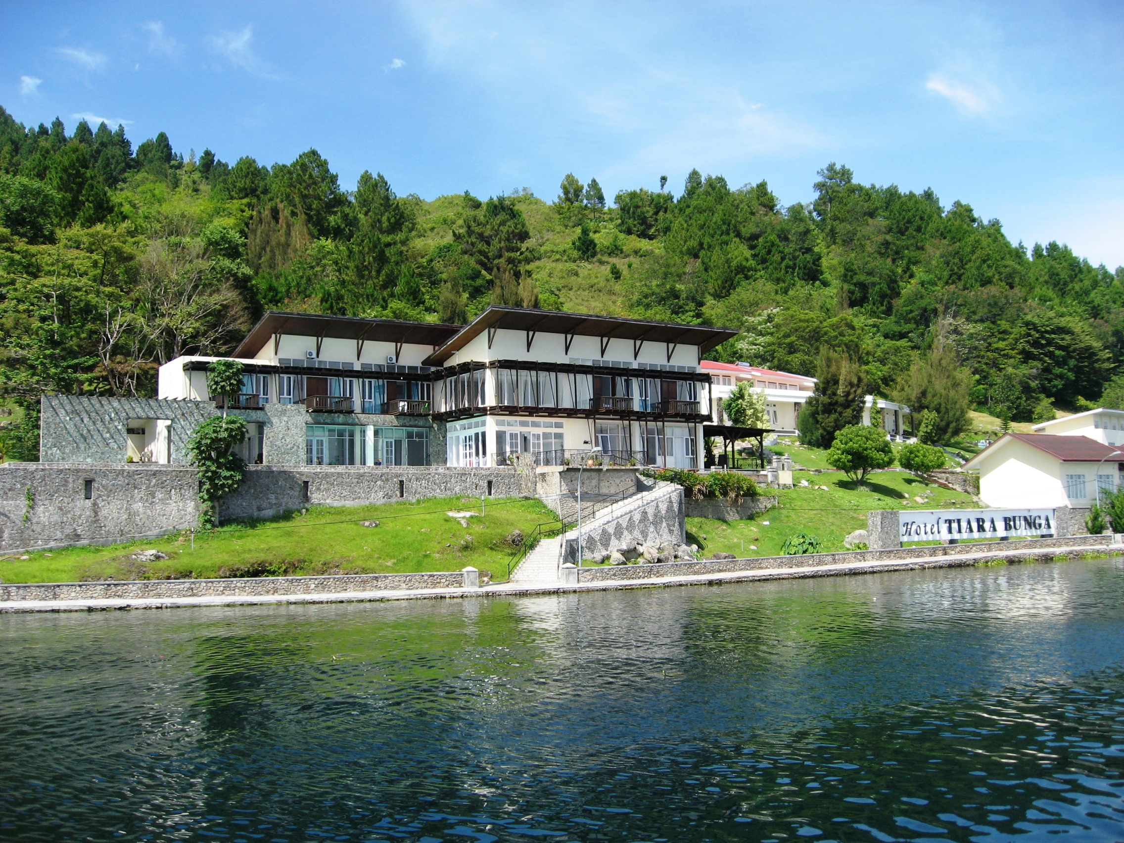 Tarabunga Balige Toba